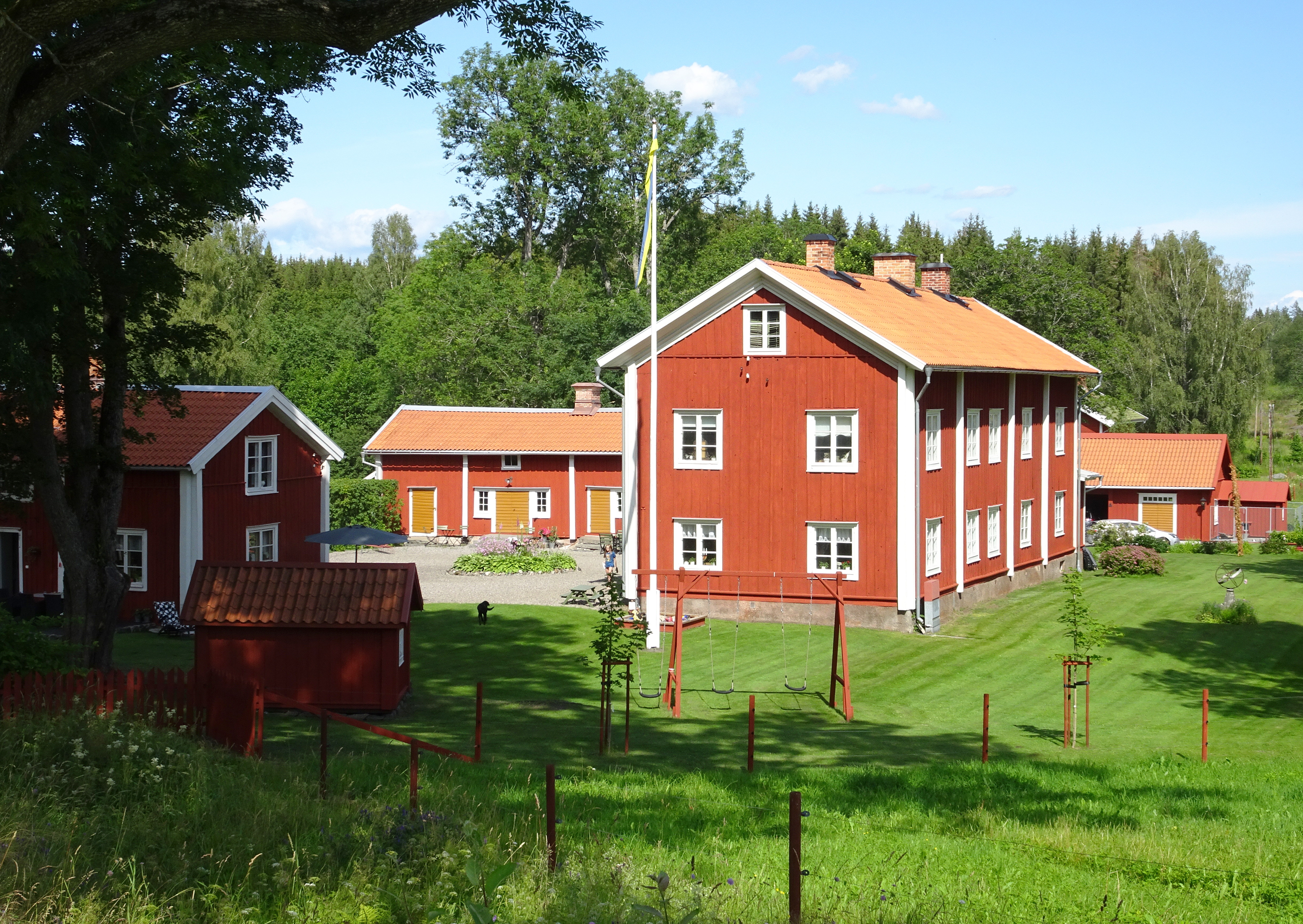 Bergmansgården i Pershyttan